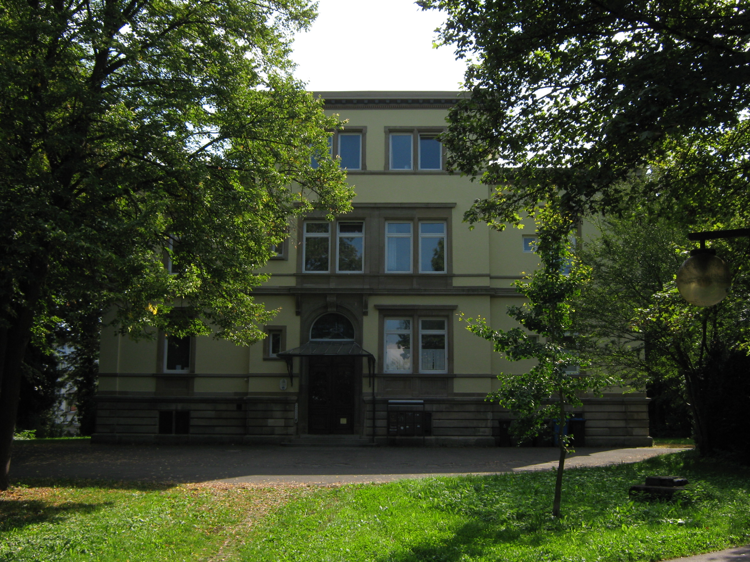 Der Kommerzienrat, Stadtrat und Papierfabrikant Ernst Louis Laiblin erbaute die Villa Laiblin 1872 in Pfullingen, Klosterstr. 82 im Stil der italienischen Spätrenaissance. Nordansicht mit Eingangsbereich.